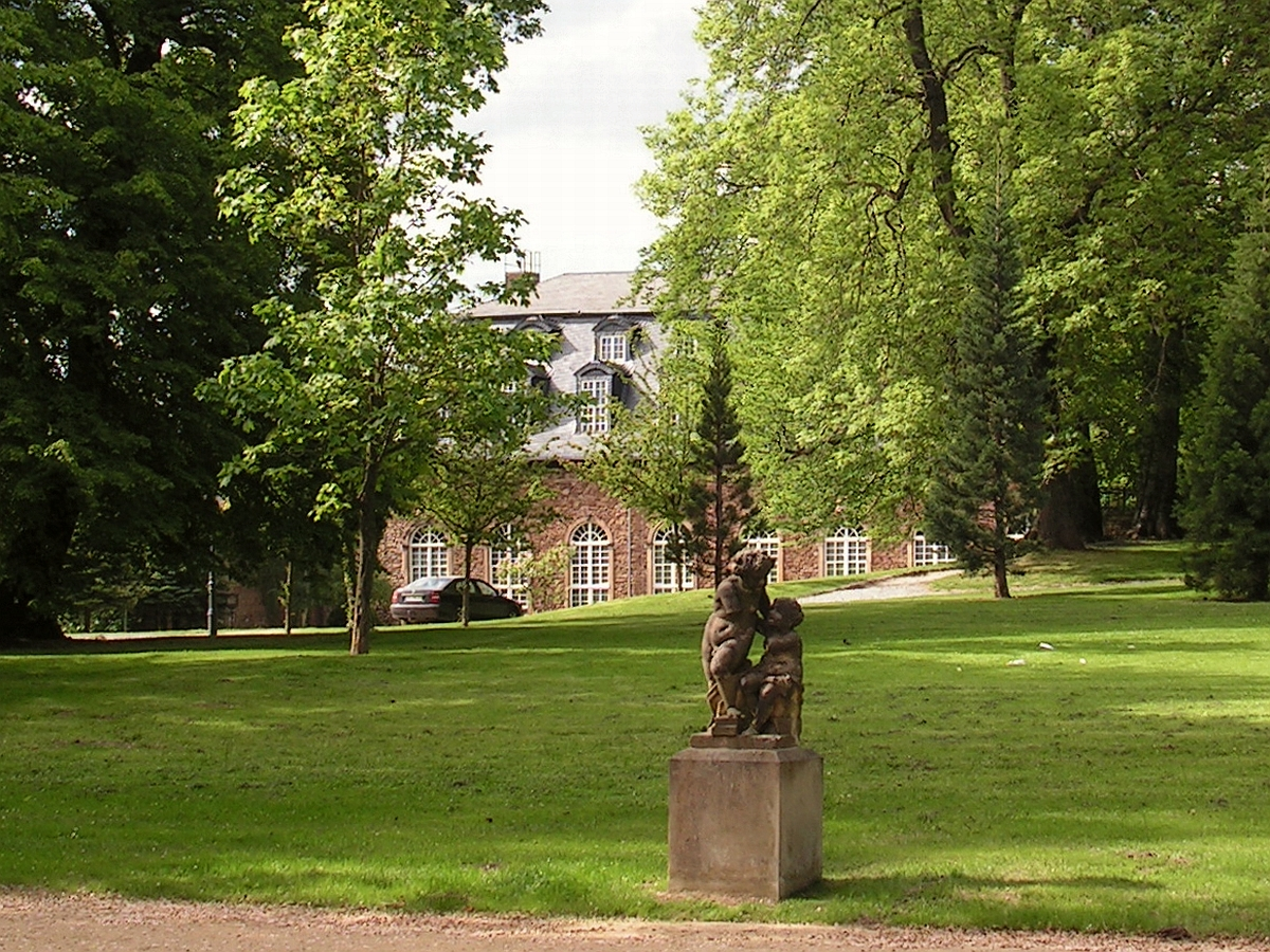 Orangerie und Kunst im Lustgarten von Wernigerode im Harz Foto 2005 Wolfgang Pehlemann Wiesbaden PICT0038